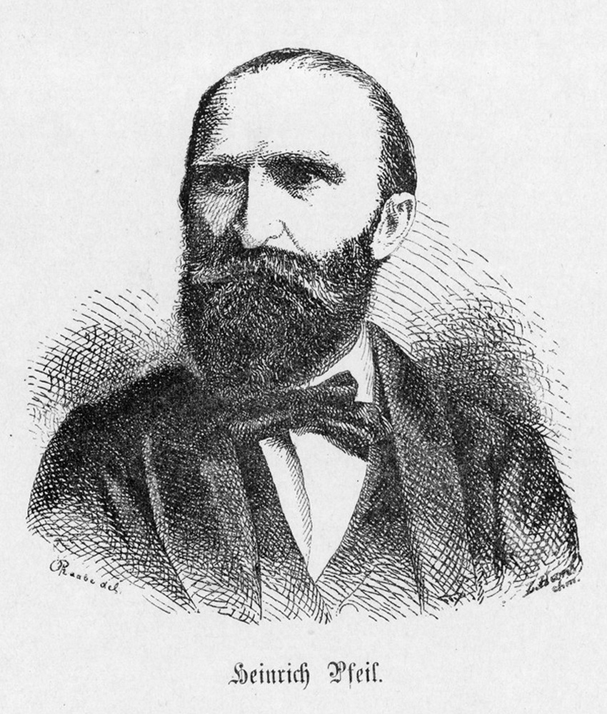 Porträt Heinrich Pfeil (1835 - 1899) - Leipzig, Deutsche Nationalbibliothek, Deutsches Buch- und Schriftmuseum, Sammlungskontext: Portraitsammlung der Börsenvereinsbibliothek, Inventar-Nr. ig19445